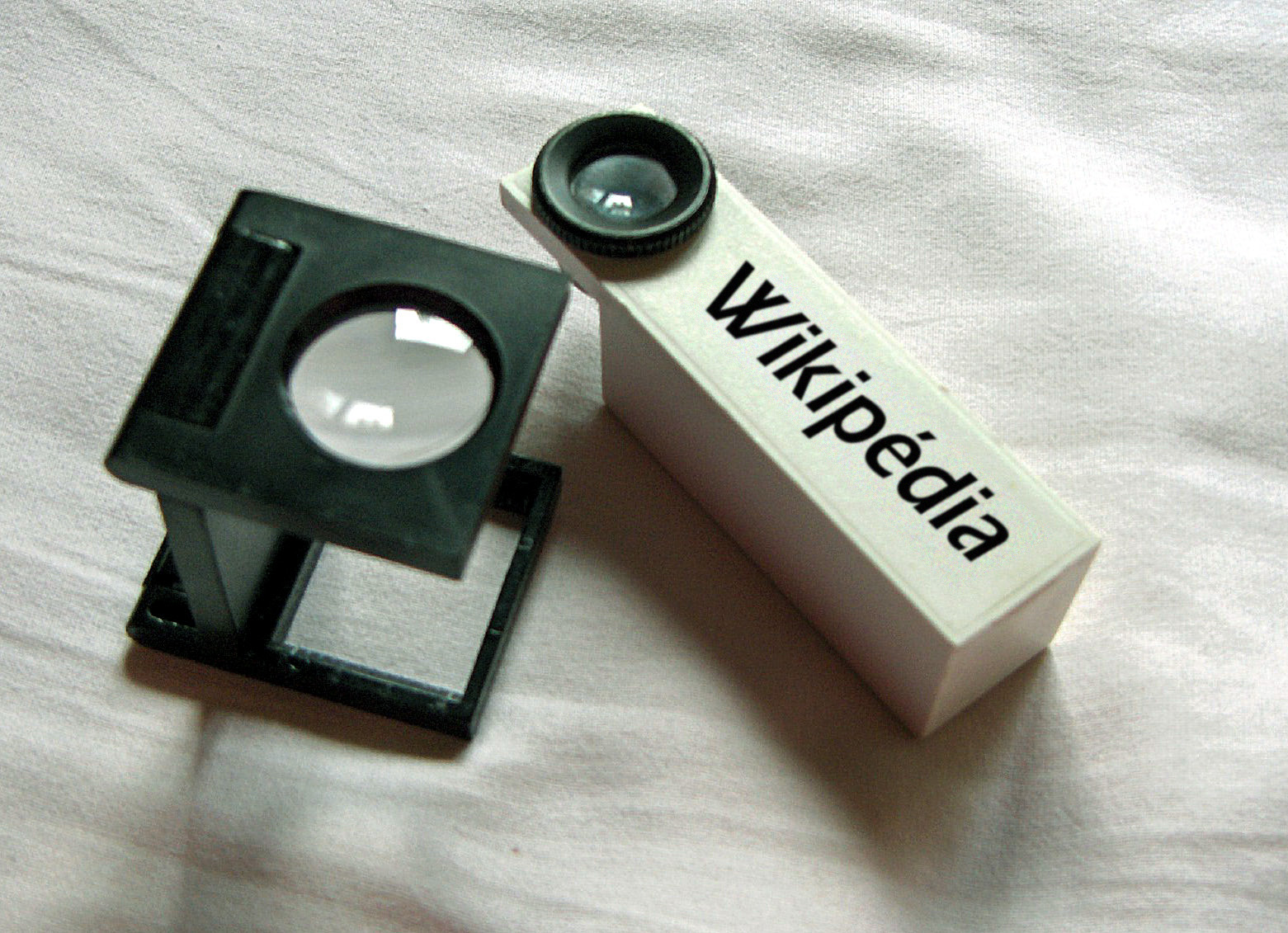 Photographie de deux compte-fils.